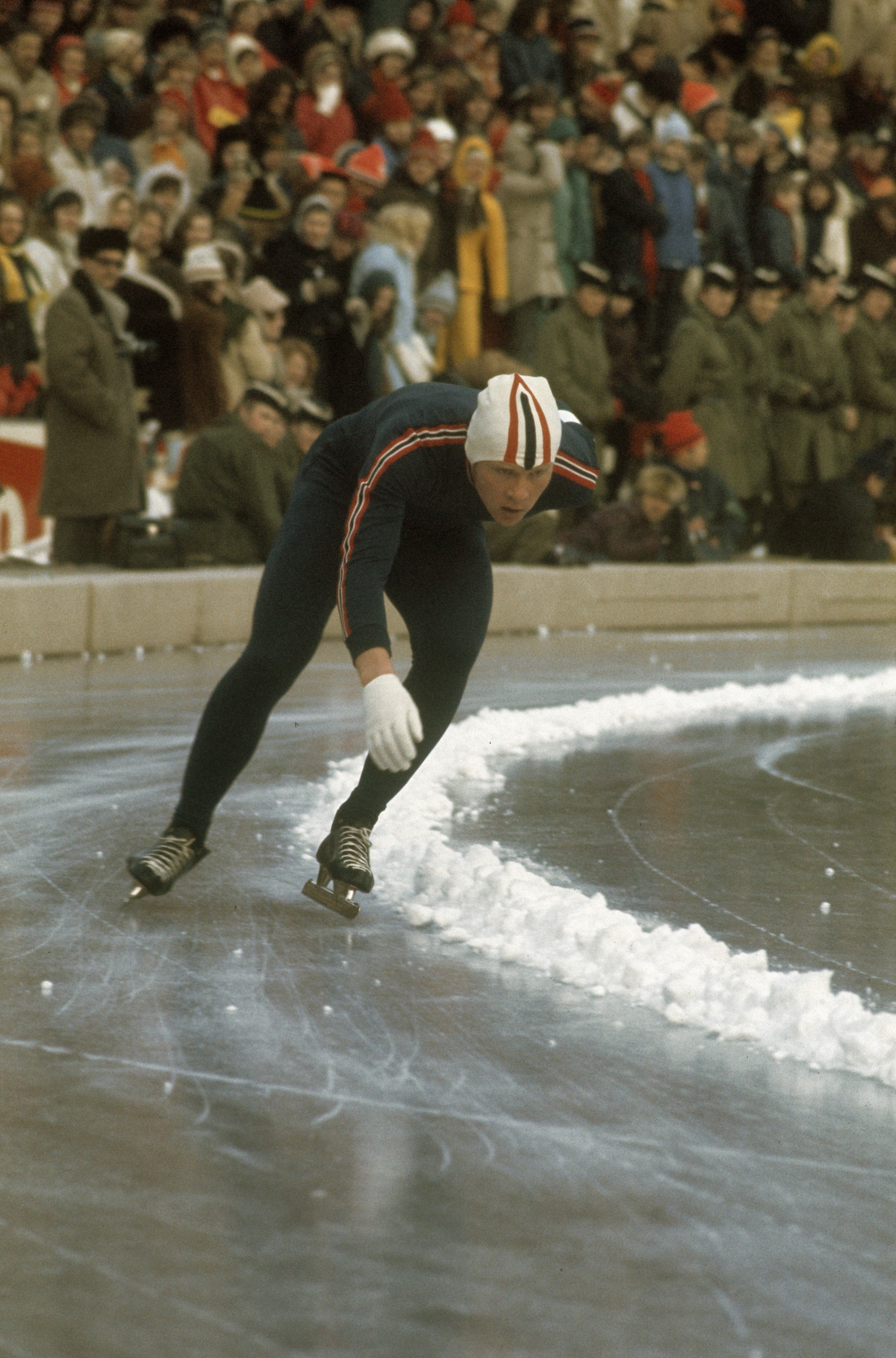 Collectie / Archief : Fotocollectie Anefo Reportage / Serie : [ onbekend ] Beschrijving : Wereldkampioenschappen schaatsen mannen allround in Oslo. Eddy Verheijen Datum : 20 februari 1972 Locatie : Noorwegen, Oslo Trefwoorden : schaatsen, schaatsers, sport Persoonsnaam : Olsen, Willy Fotograaf : Verhoeff, Bert / Anefo Auteursrechthebbende : Nationaal Archief Materiaalsoort : Dia (kleur) Nummer archiefinventaris : bekijk toegang 2.24.01.06 Bestanddeelnummer : 254-9160